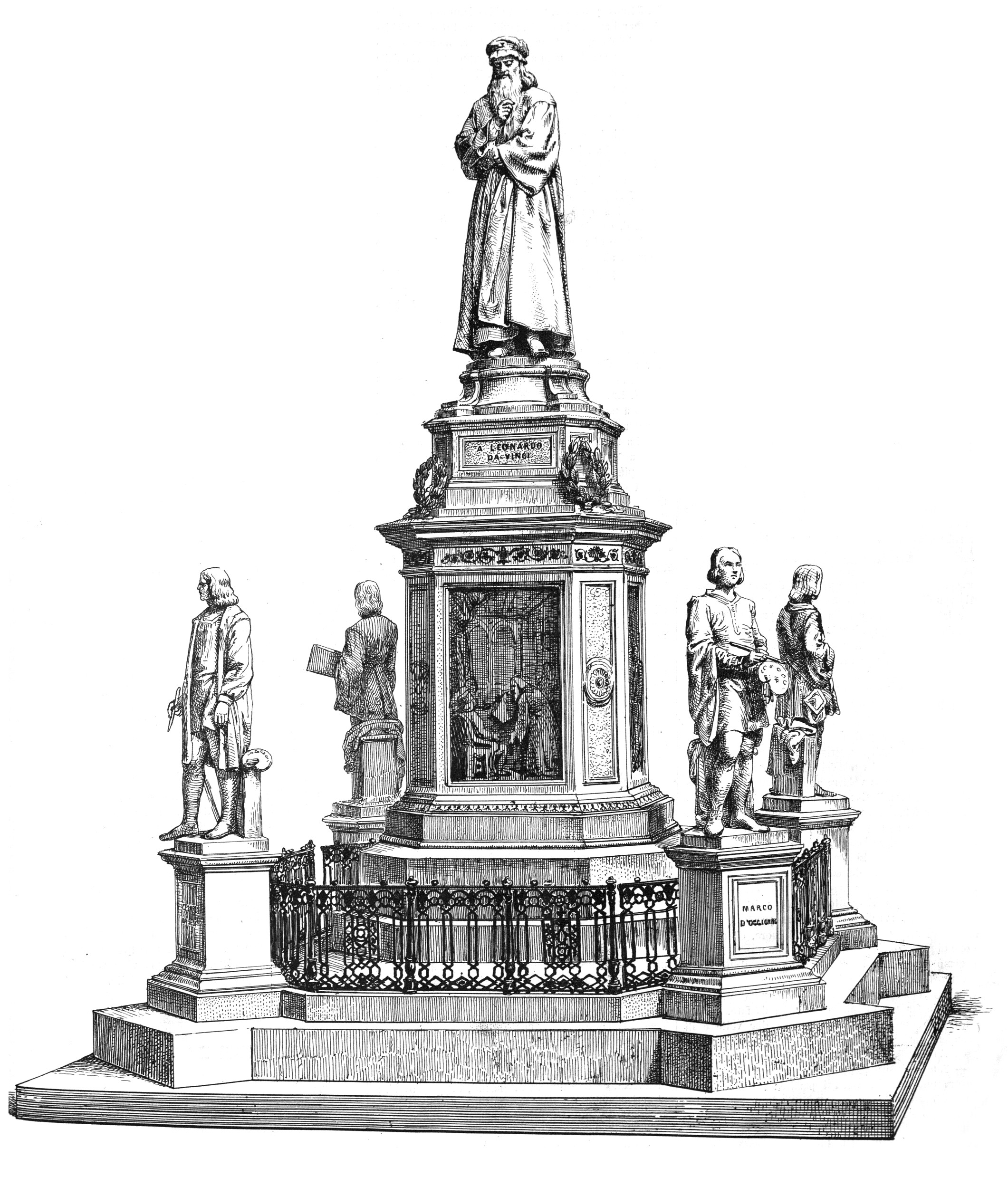 Monumento a Leonardo da Vinci - Modello del 1864